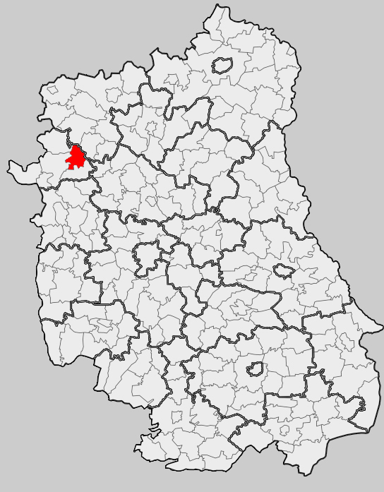 Map of gmina Nowodwór, Ryki county, Lublin voivodship Mapa gminy Nowodwór, powiat rycki, województwo lubelskie